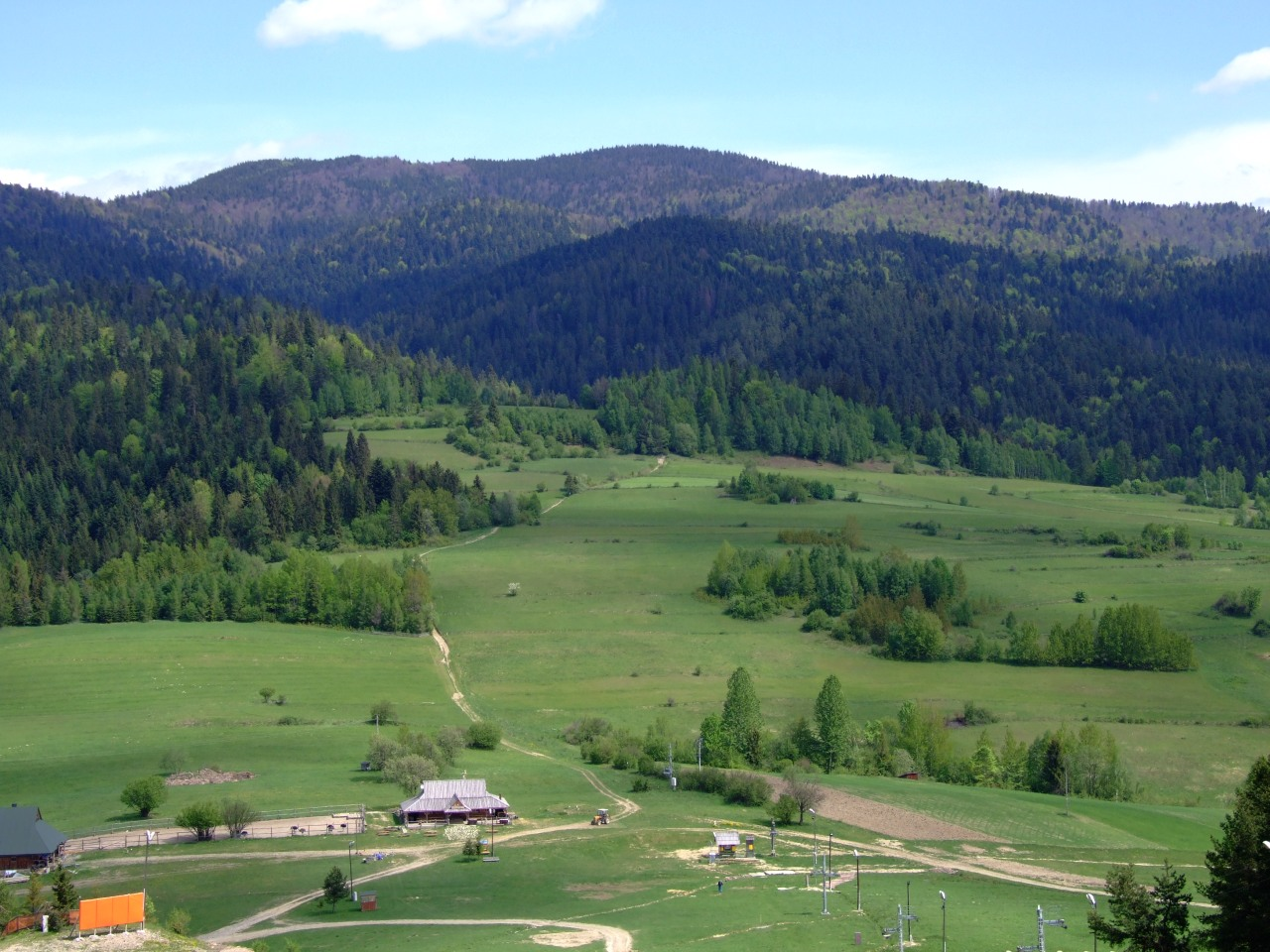 Lubań i przełęcz Drzyślawa w Gorcach, widok ze szczytu Wdżaru